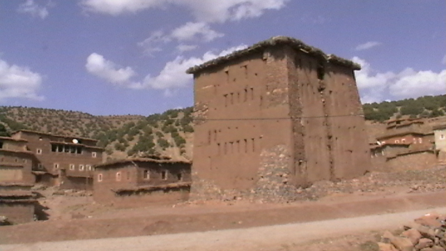 Walon: vî gurnî e mitan d' on viyaedje dins les Ayit Bouguemmez